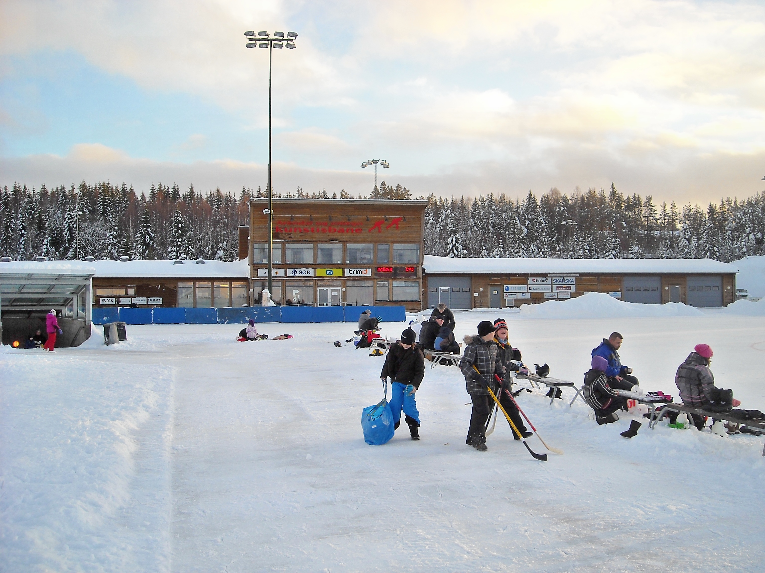 Arendal og omegn kunstisbane